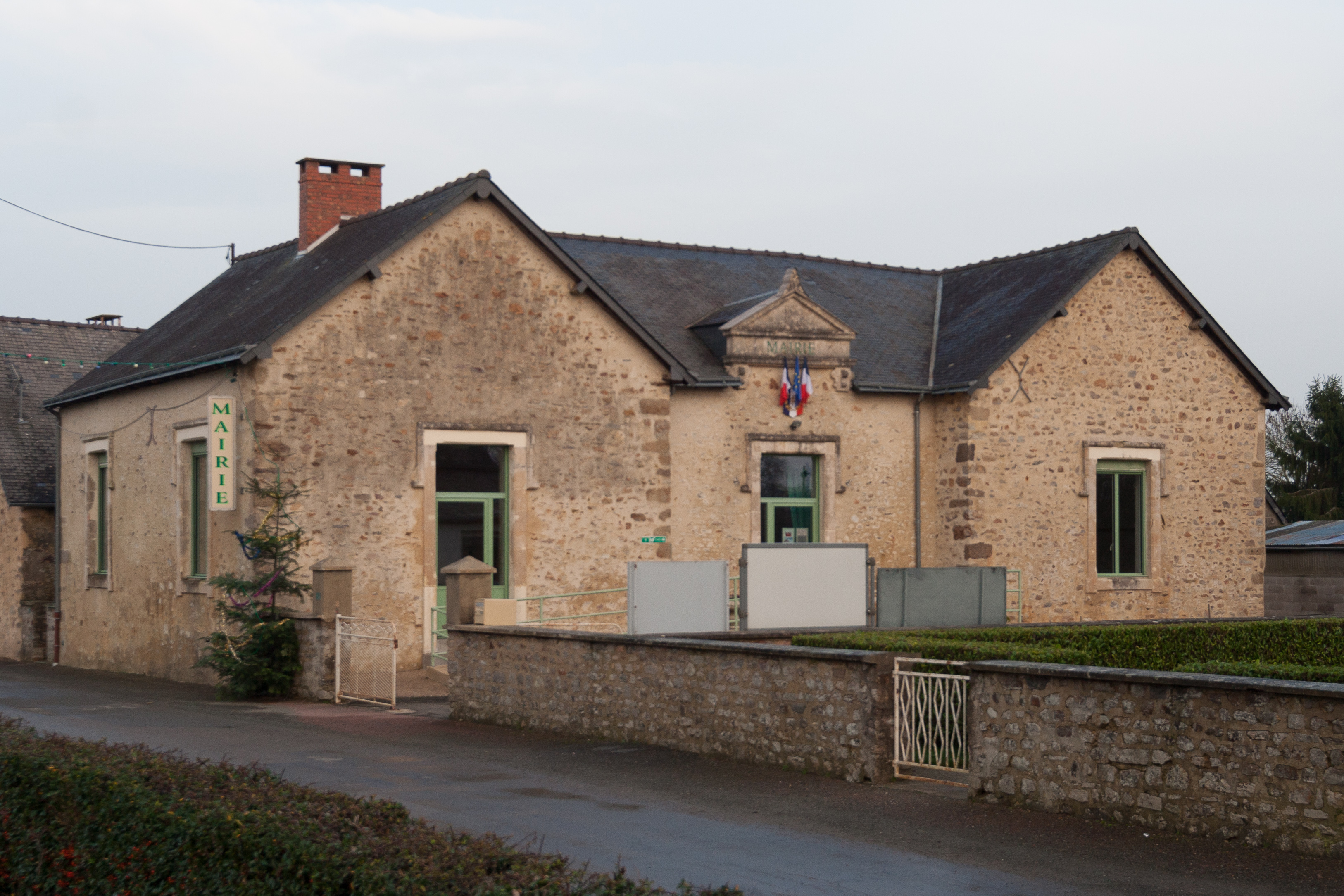 Mairie de Neuvillette-en-Charnie.